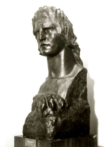 Sfinxul, Gips patinat; ronde-bosse - Muzeul Naţional de Artă al României - BUCUREŞTI, Nr. inventar / Accession number 6990/44, Ordin de clasare / Listing order 2510/24.01.2003 - Tezaur. Compoziţia figurativă, simbolistică reprezintă un bust de bărbat, în faţă o gheară de leu, întregul modelaj dând un aspect de monumentalitate